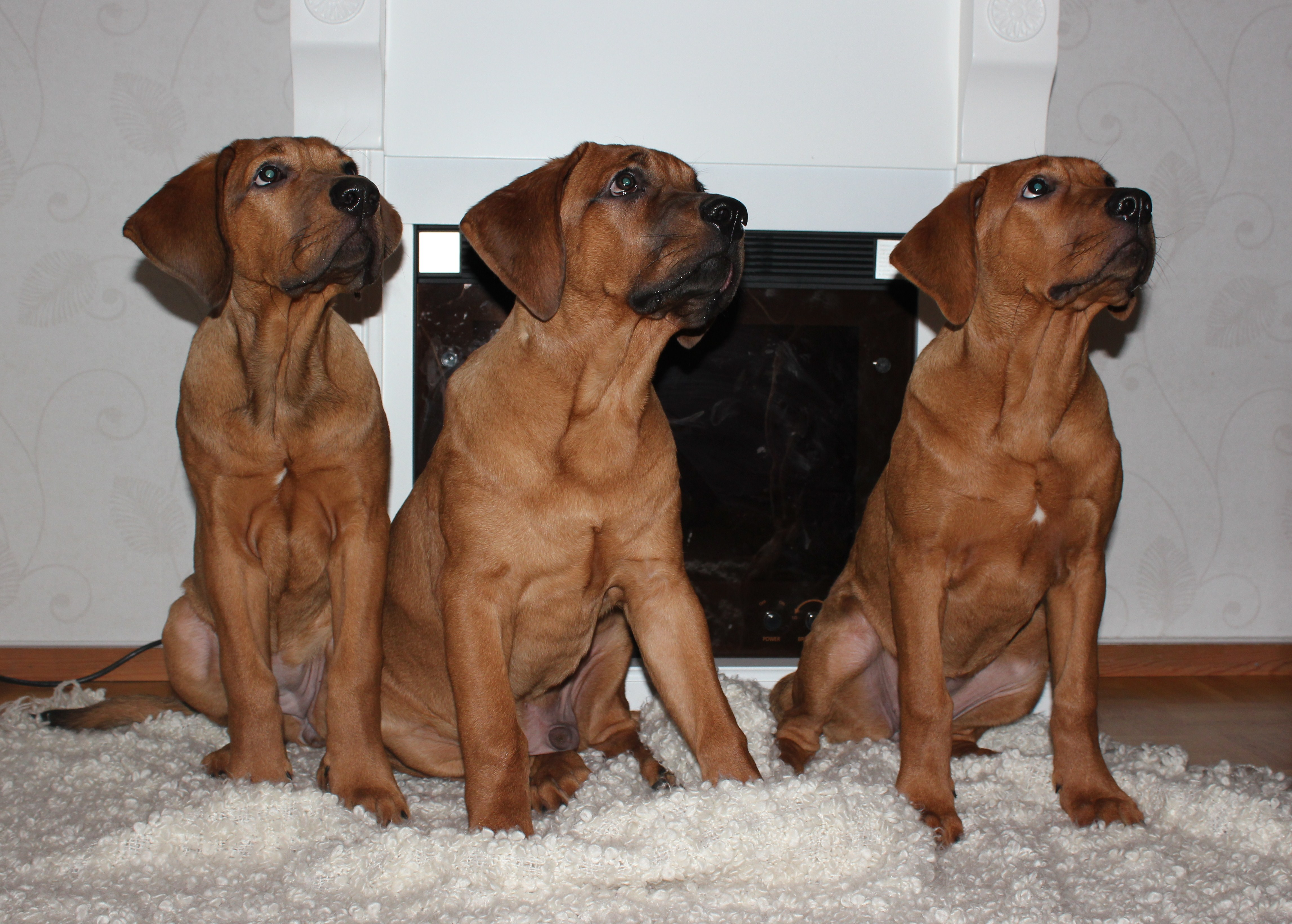 Immortalwarriors Ayano, Akito & Akira